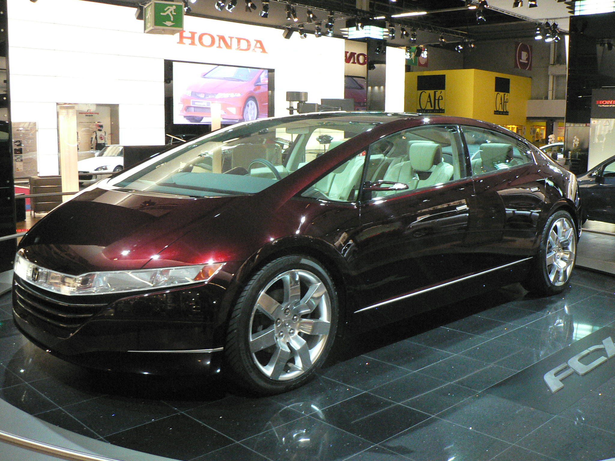 Mondial de l'automobile, Paris 2006